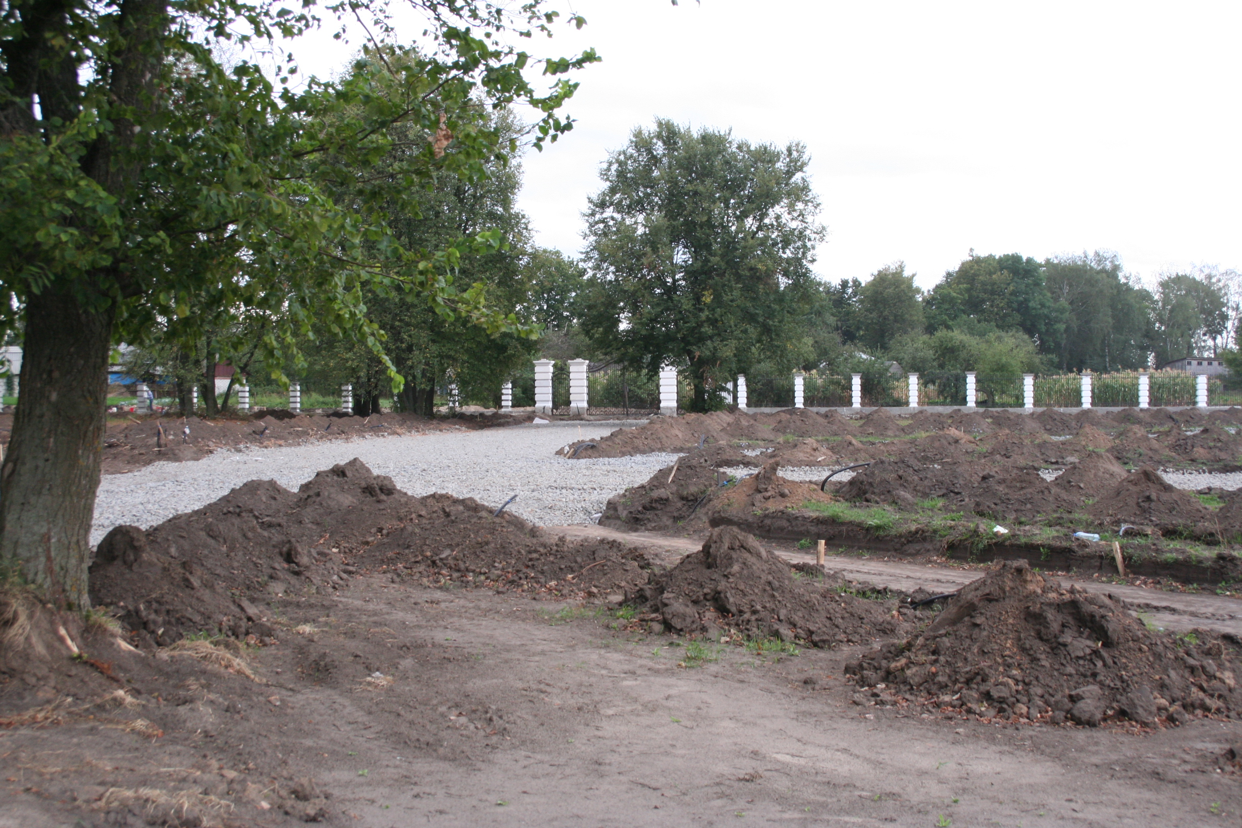 Облаштування парку палацу Розумовського у Батурині